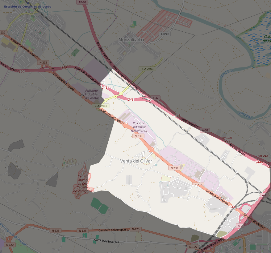 Mapa del distrito de la Venta del Olivar en Zaragoza.